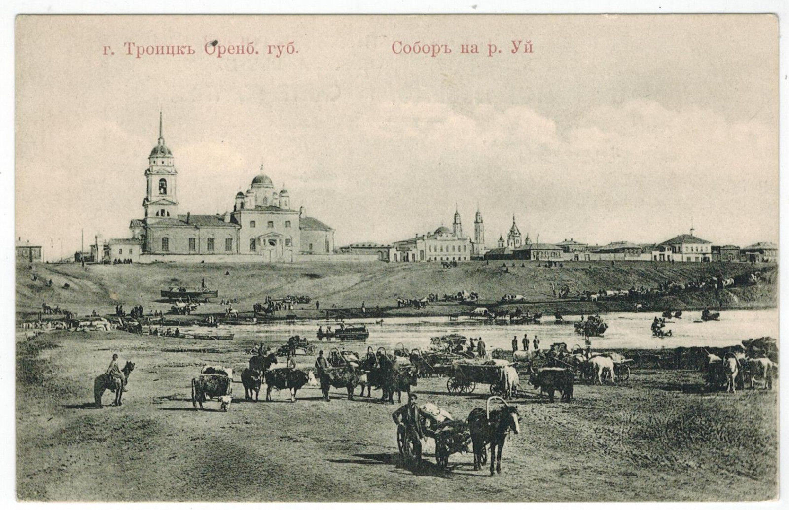 Дореволюционная открытка «Собор на р. Уй». Издание писчебумажного магазина А. Сосновского